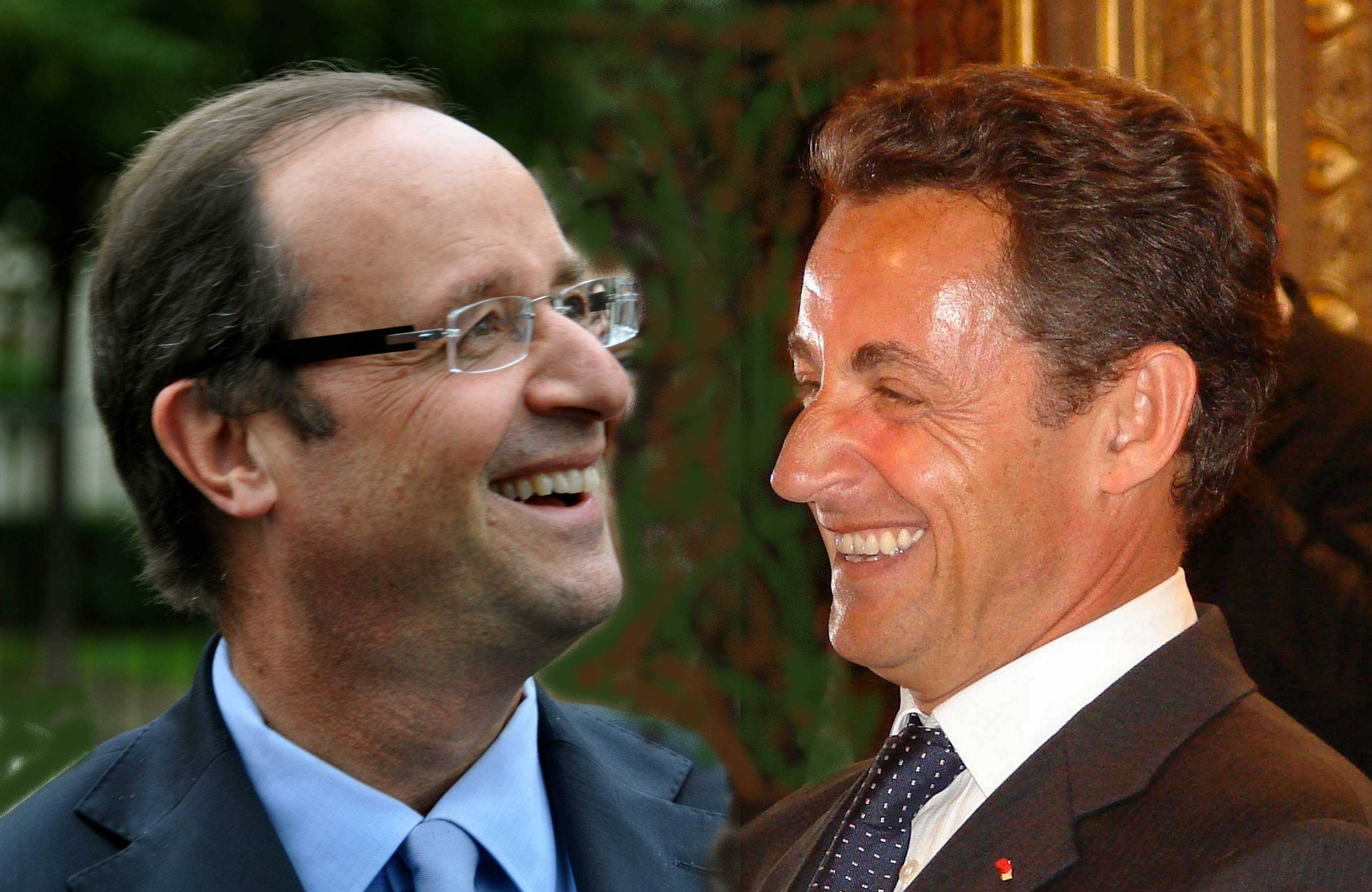 Montage avec deux photos déposées sur Commons